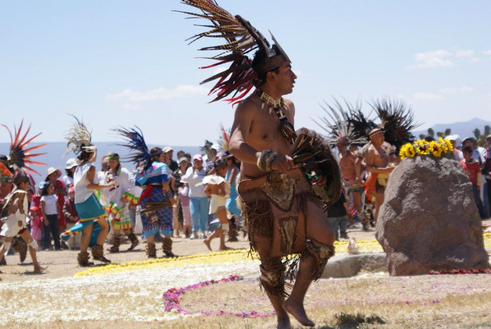 Danza en Huapalcalco